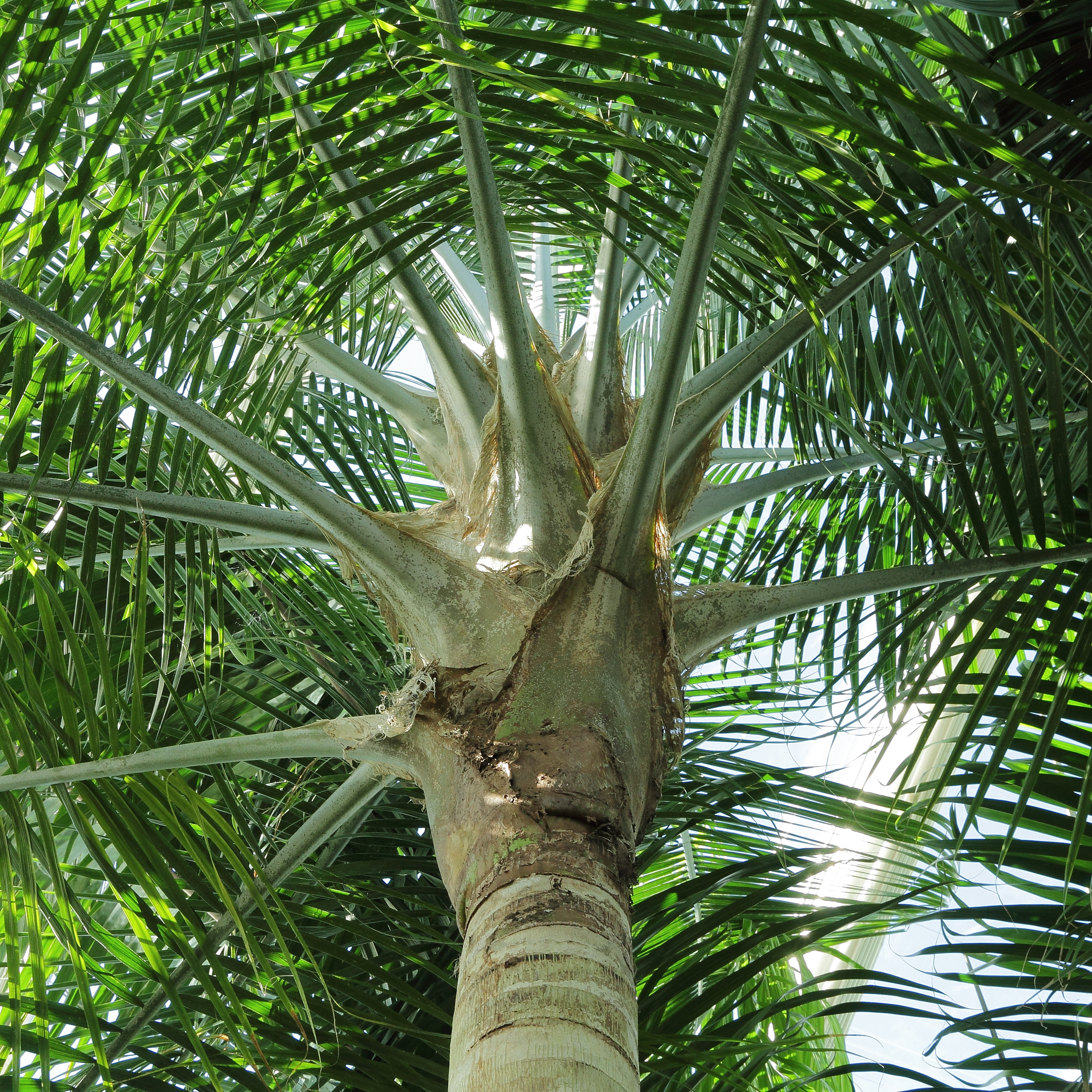 Ravenea rivularis i Bergianska trädgården.